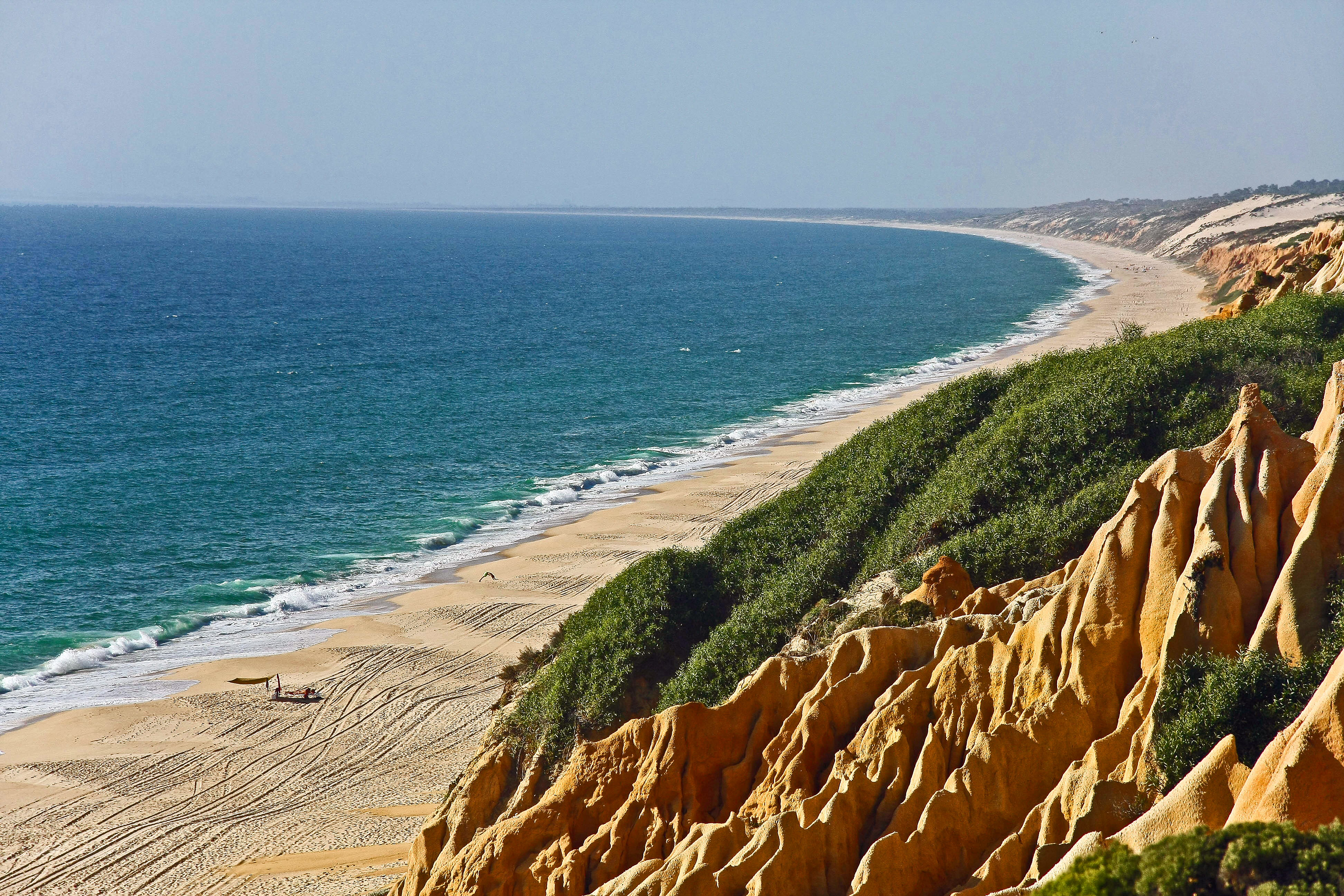 Litoral entre a Praia da Galé-Fontainhas e a Praia do Pinheirinho - Portugal